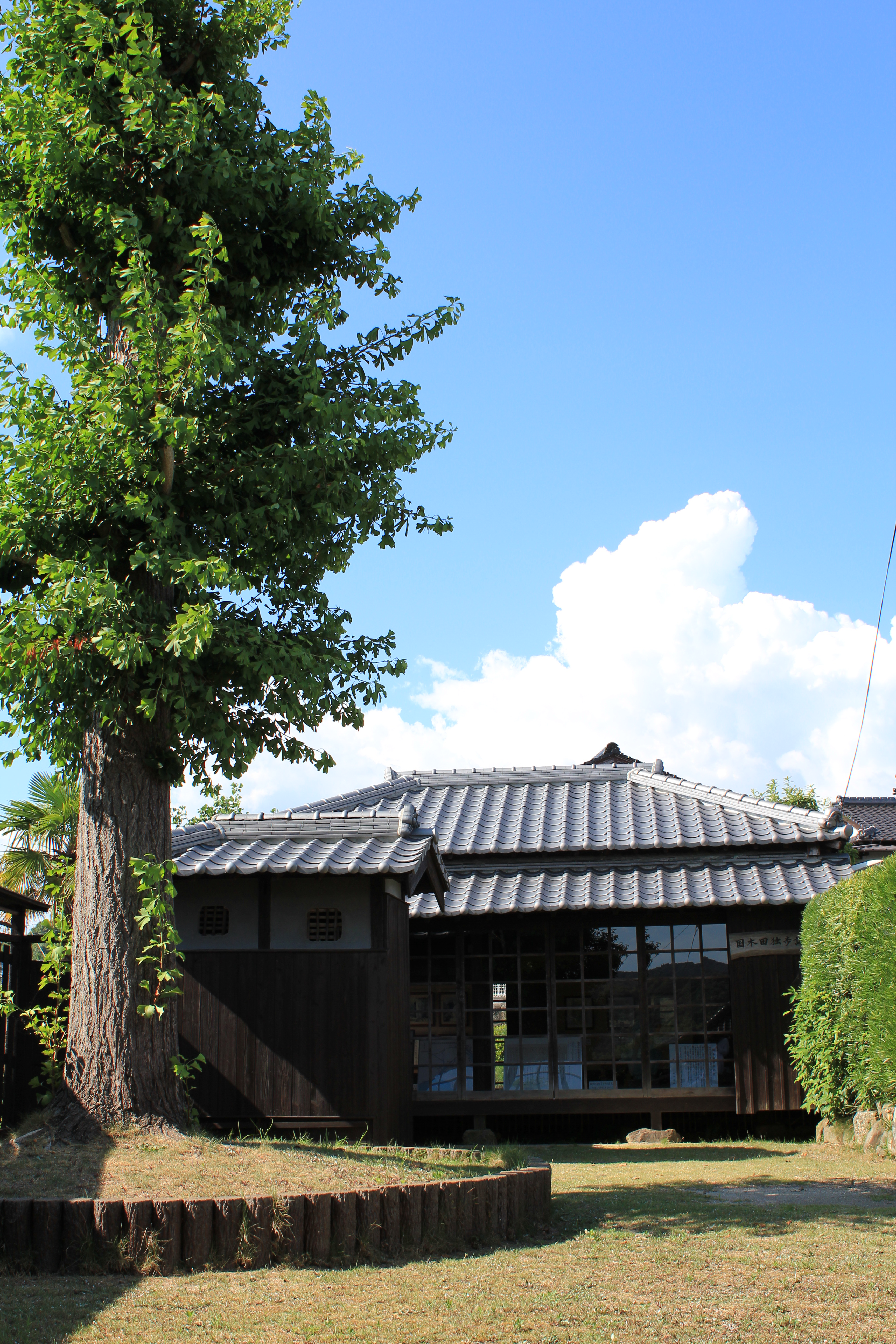 国木田独歩旧宅